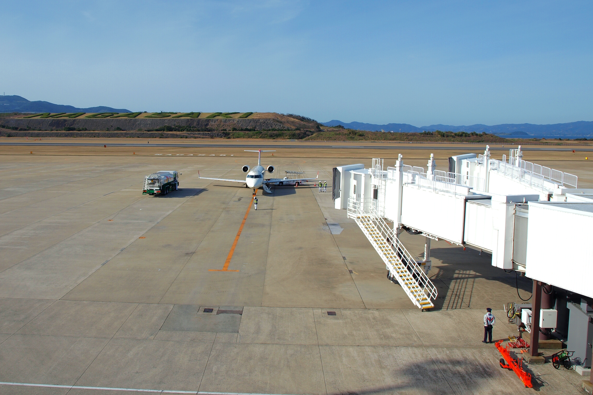 長崎空港展望デッキよりエプロン・滑走路を望む。奥の丘陵に「NAGASAKI」の花文字が見て取れる。